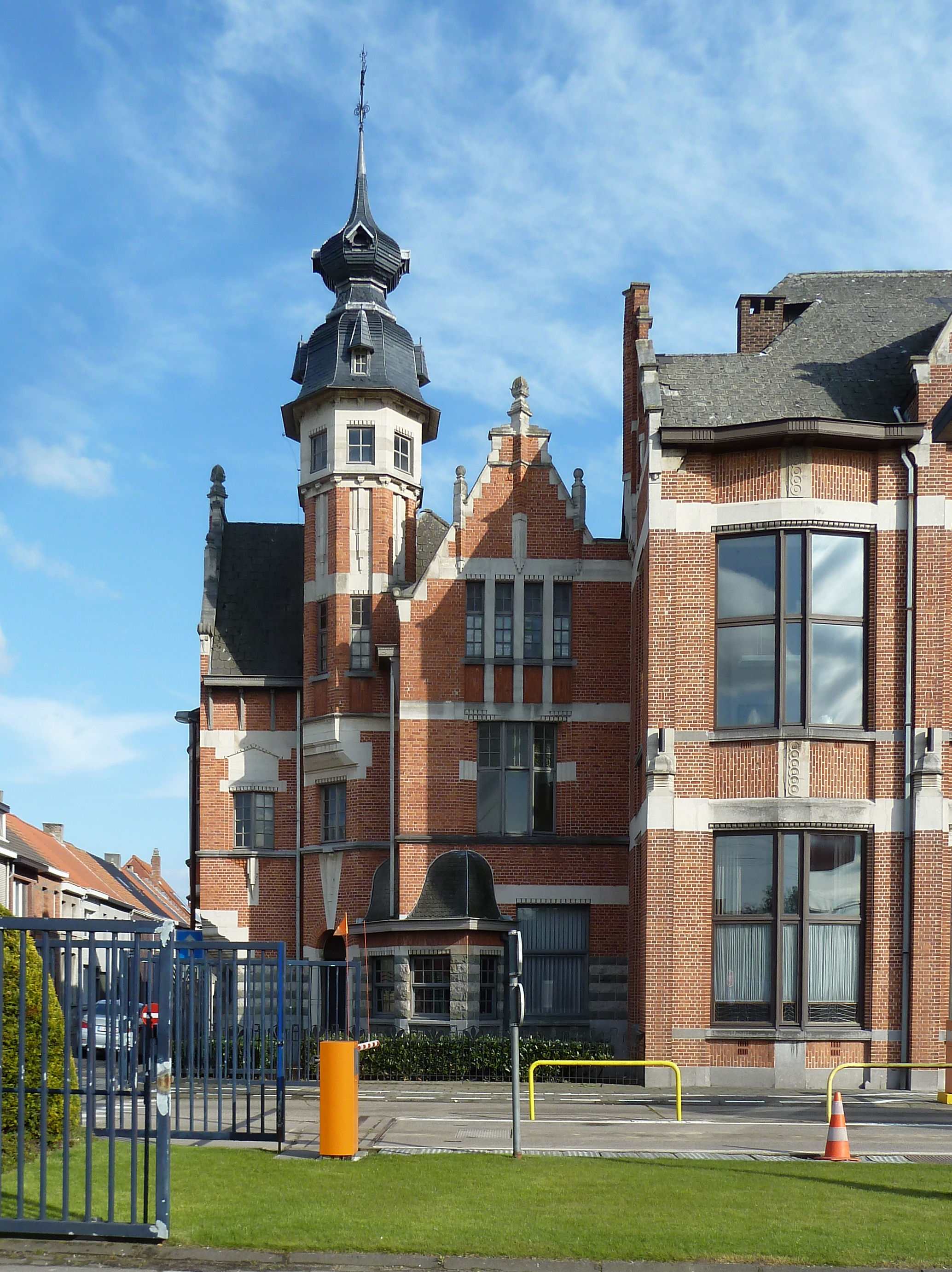 Scheerders Aarschotstraat